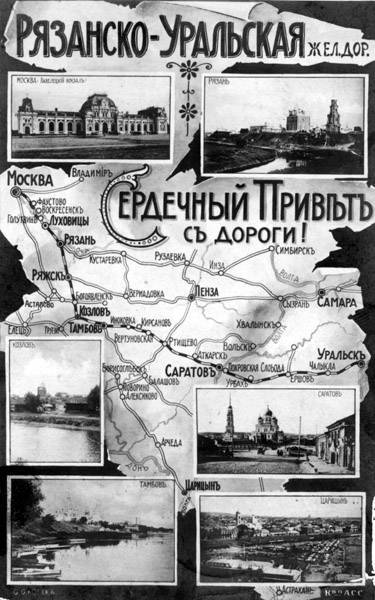 Сердечный привет с дороги Изображены линии и ветви Р.У.ж.д.